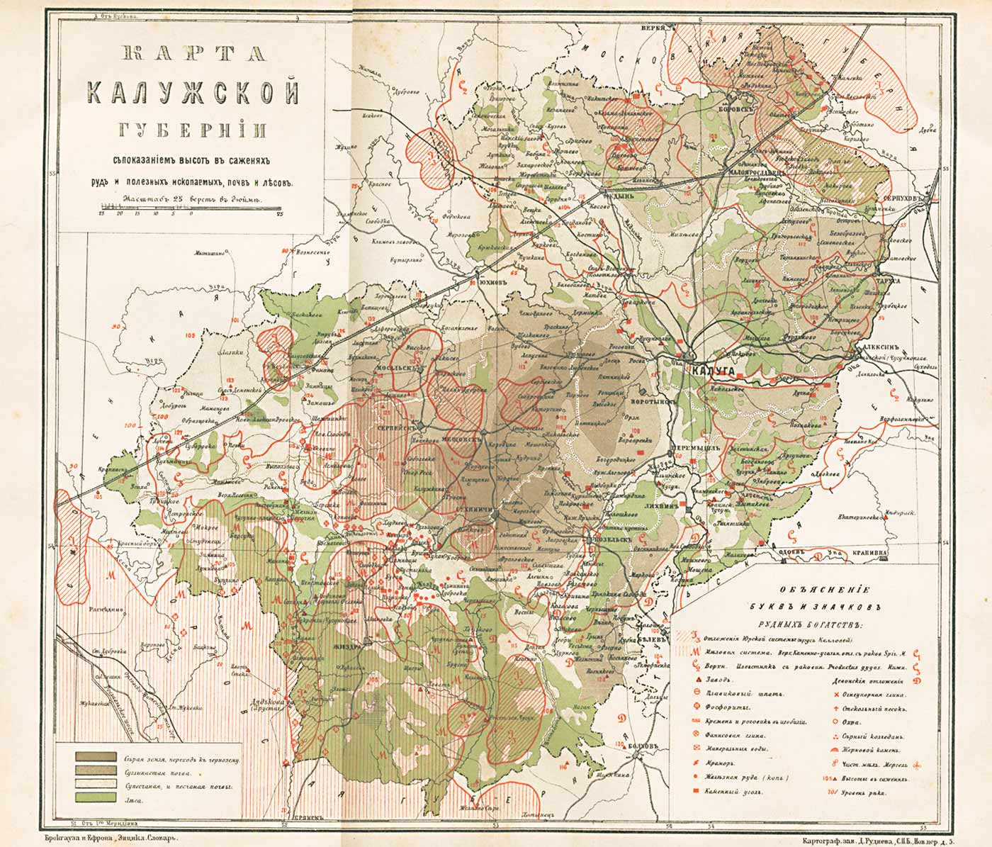 Карта Калузької губернії. Енциклопедичний словник Брокгауза і Єфрона